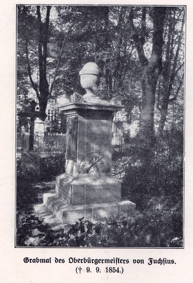 t